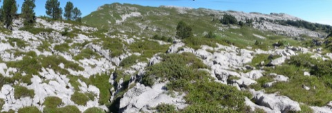 Blick über das Karstfeld Siebenhengste